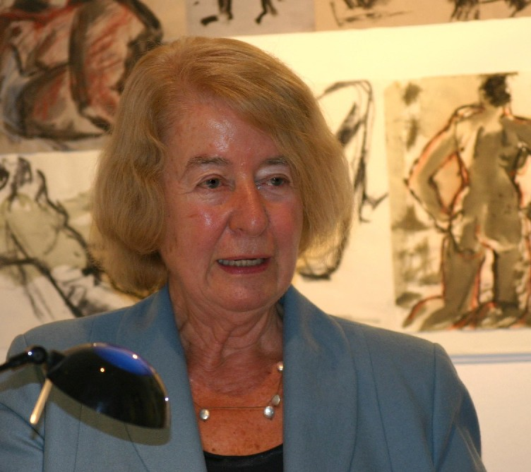 Die Erziehungswissenschaftlerin und ehemalige Vizepräsidentin des Berliner Abgeordnetenhauses Hilde Schramm während einer Buchlesung in Berlin.